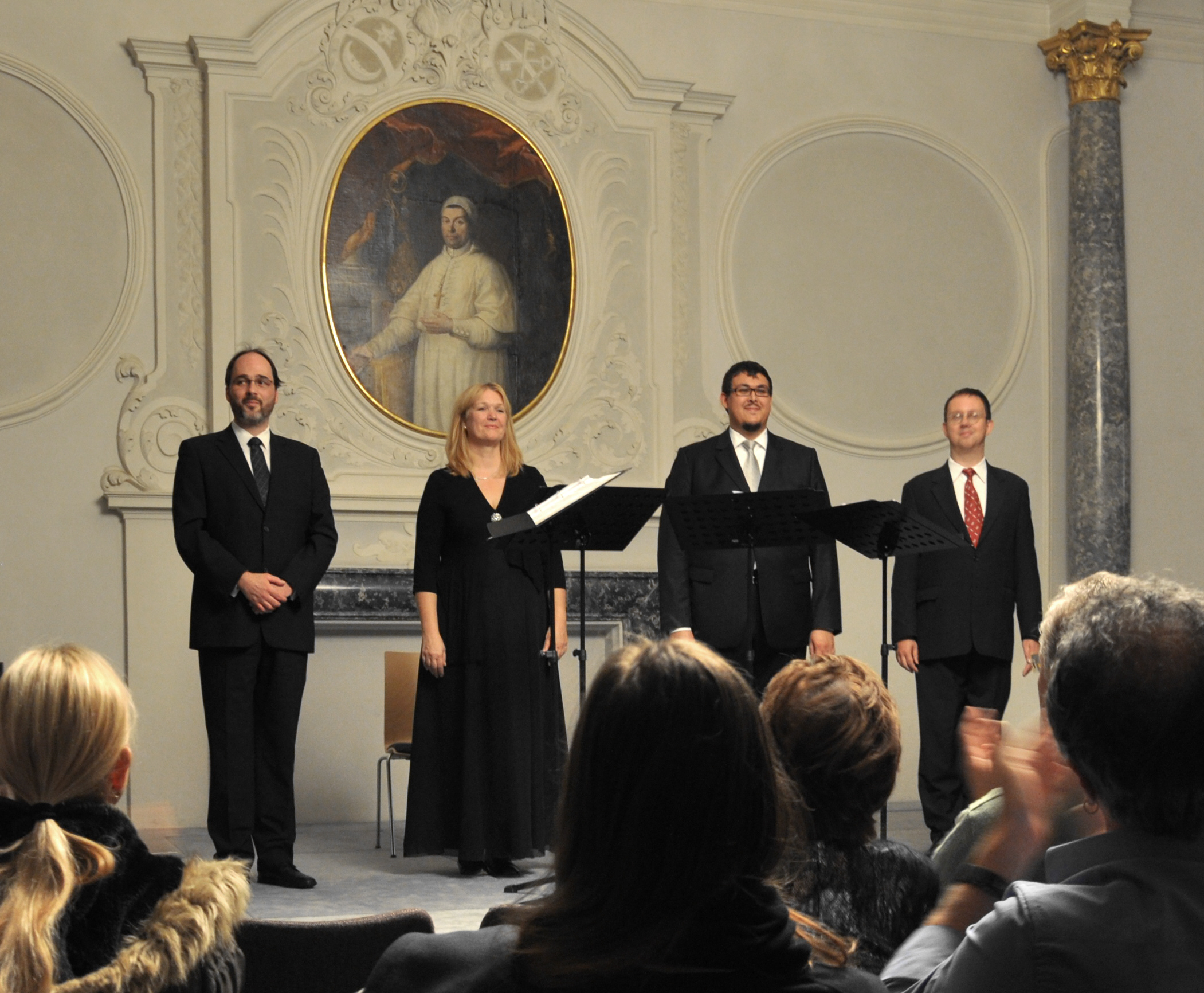 Weißenau, Konventsbau der ehemaligen Reichsabtei Weißenau, Festsaal beim Schlussapplaus eines Konzerts mit dem Peñalosa-Ensemble